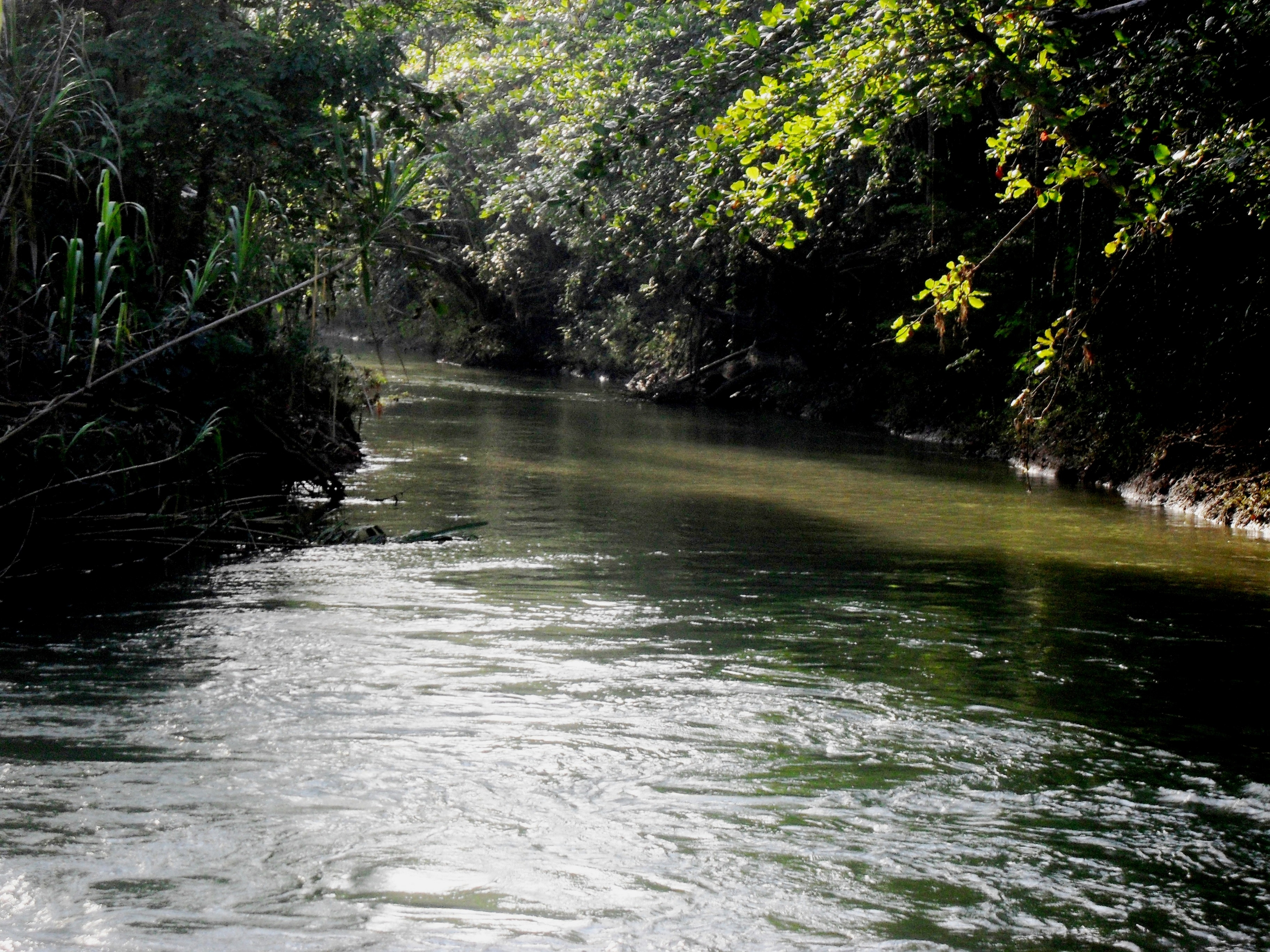 "Rio Camuy"